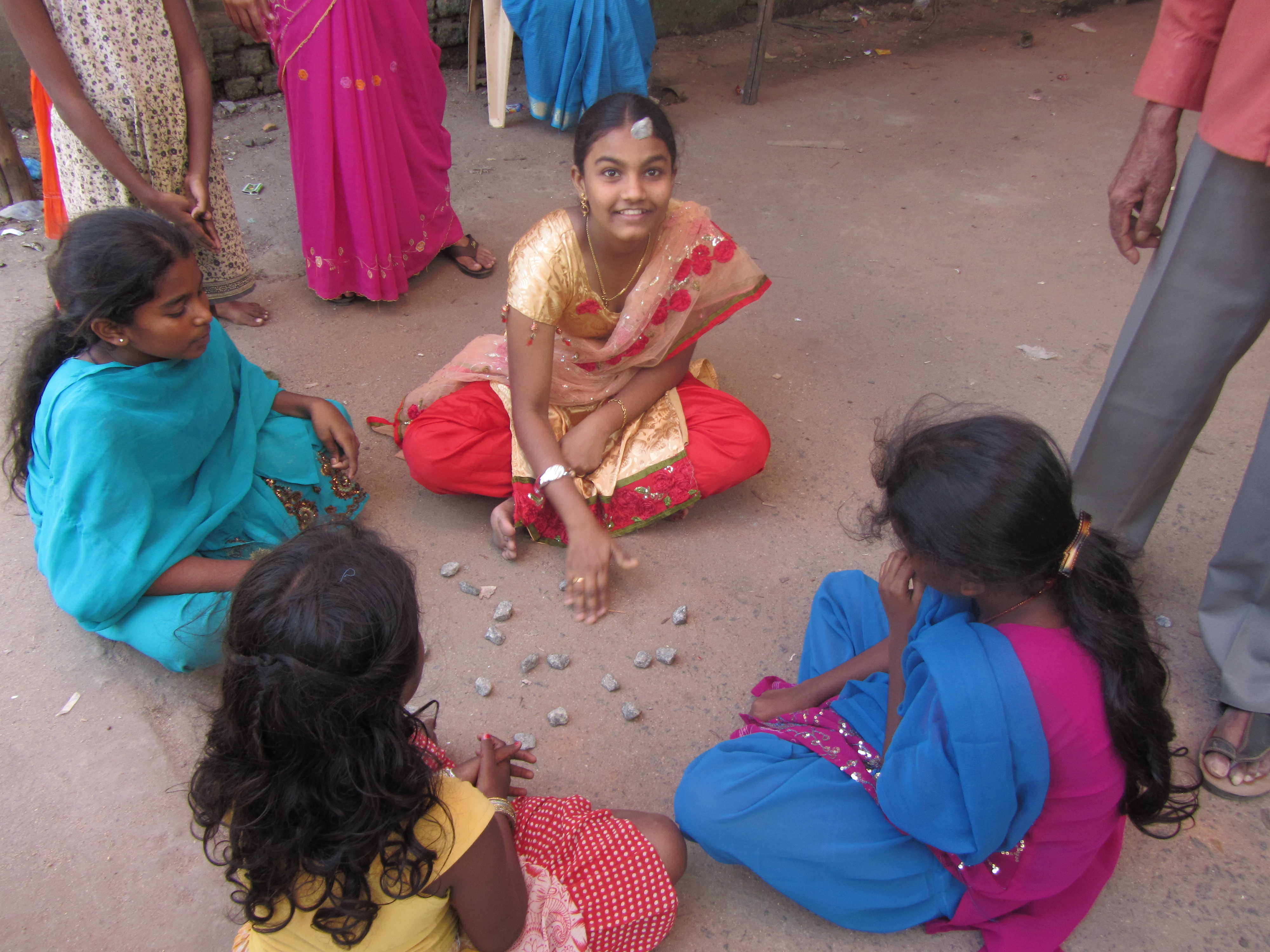 own shot - தட்டாங்கல், தமிழக நாட்டுப்புறச் சிறுமியர் விளையாட்டு. பாண்டி விளையாட்டு என்றும் இதனைக் கூறுவர். சங்ககாலத்தில் இந்த விளையாட்டின் பெயர் 'தெற்றி'